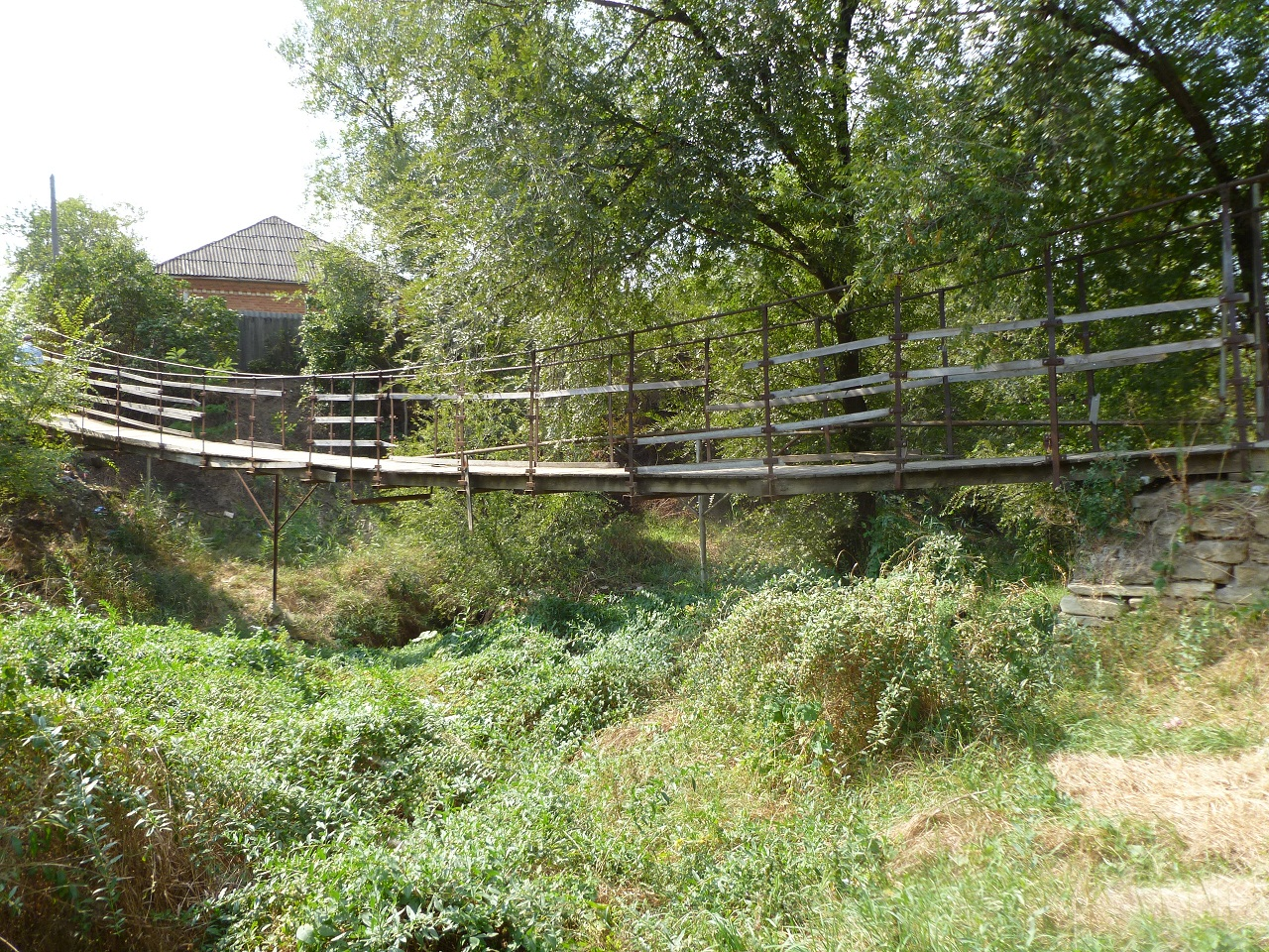 Подвесной мост